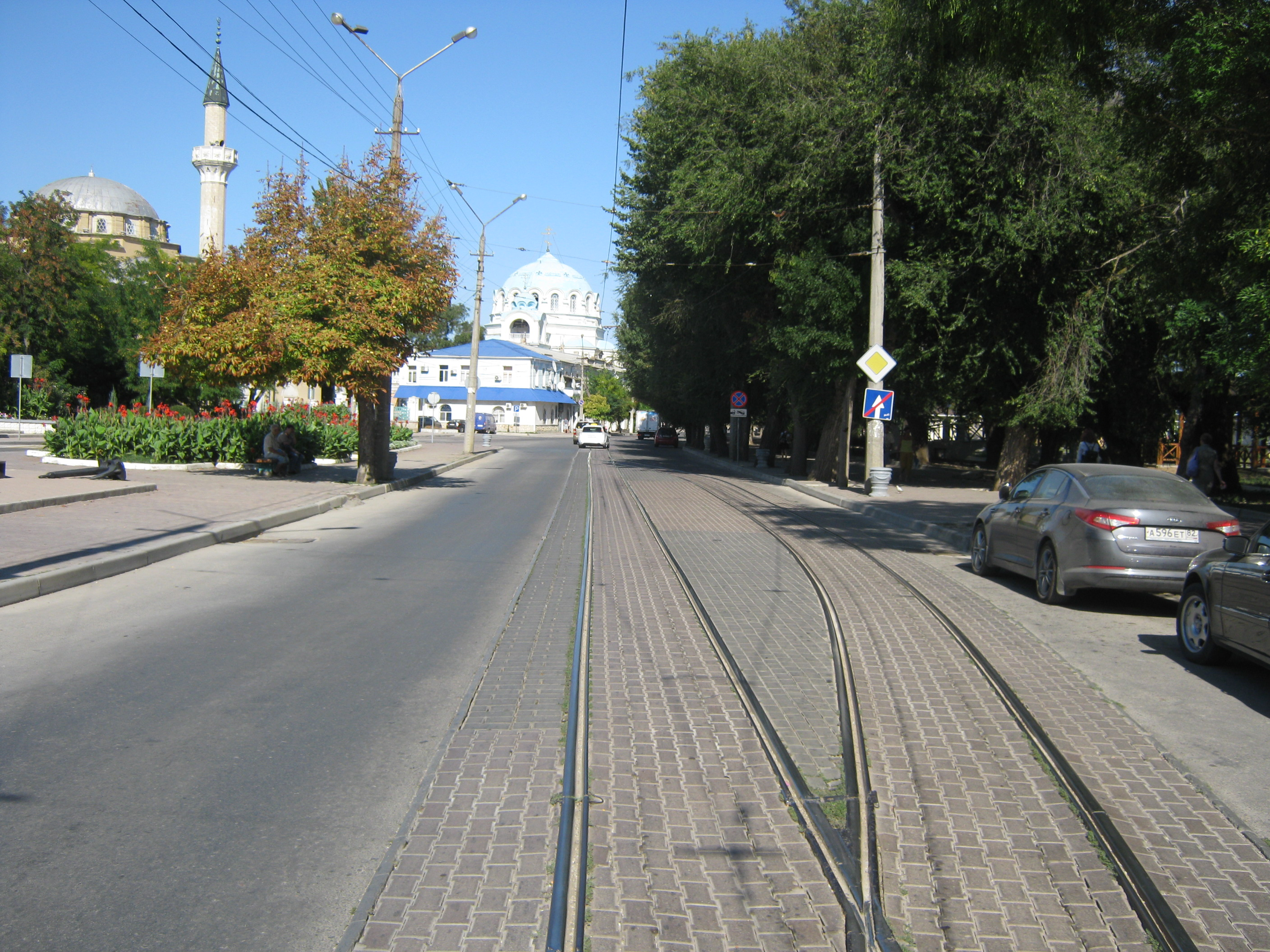 Разъезд на улице Революции в Евпатории